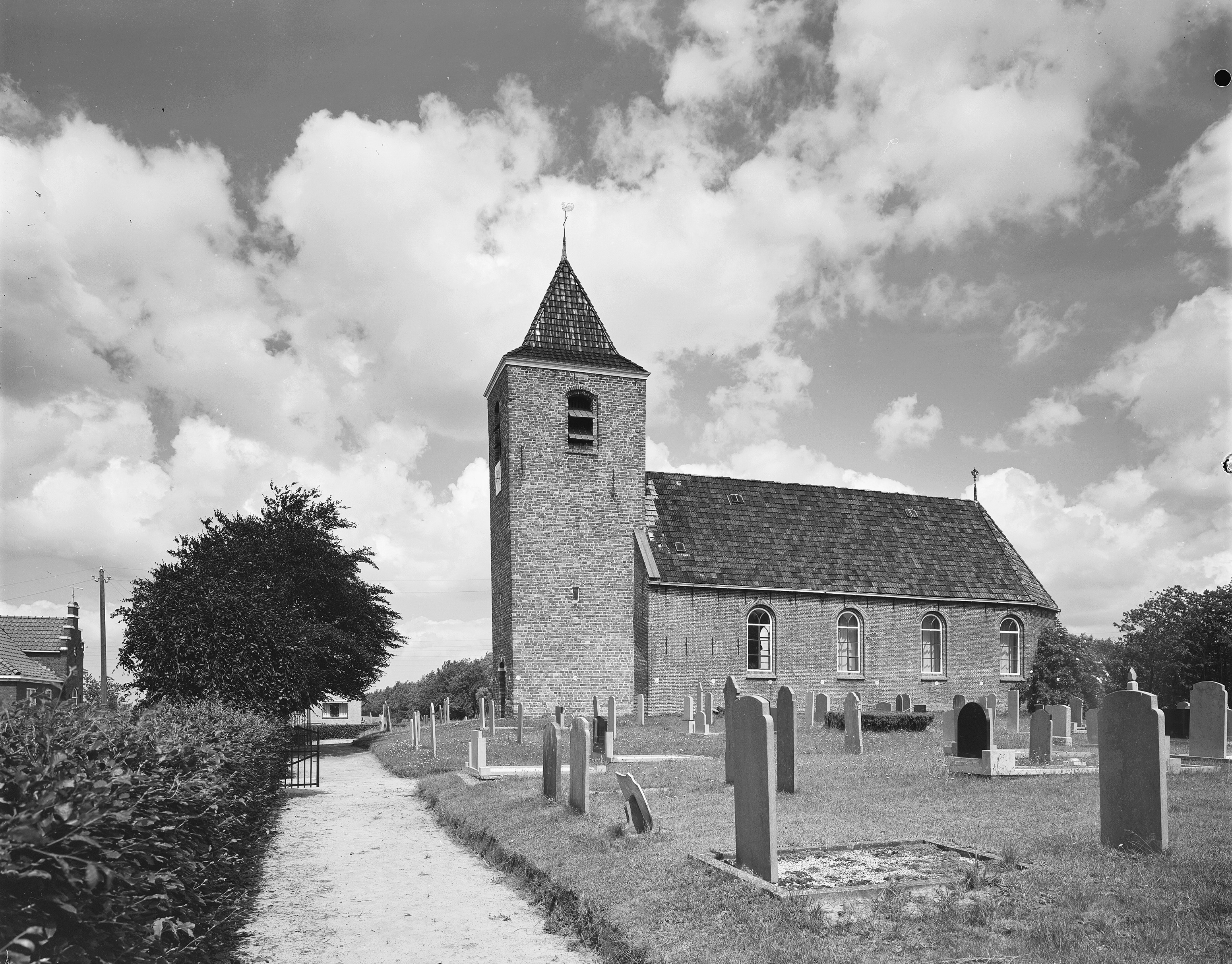 Nederlands Hervormde Kerk: exterieur zuidgevel